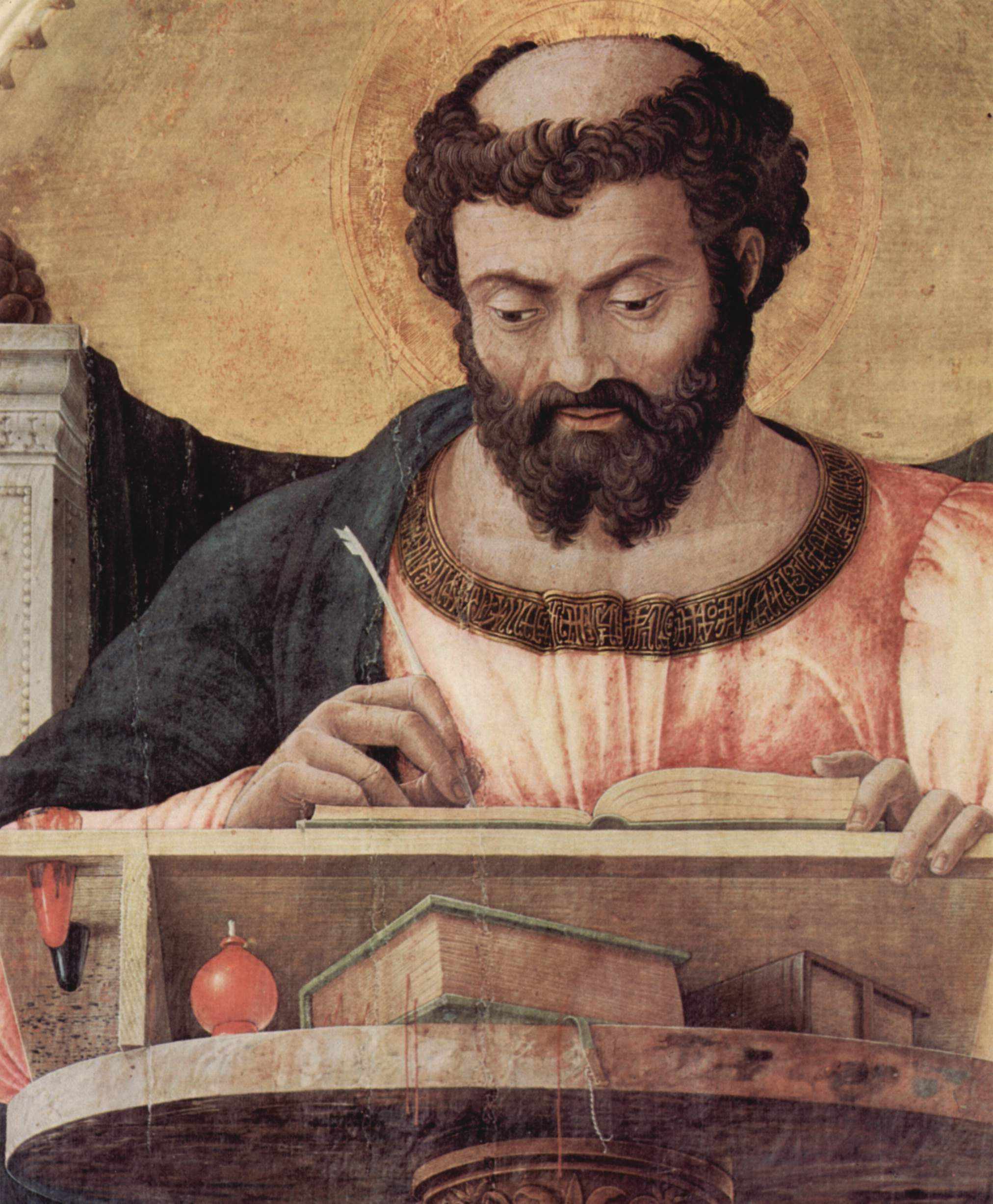 detail: St. Lucas